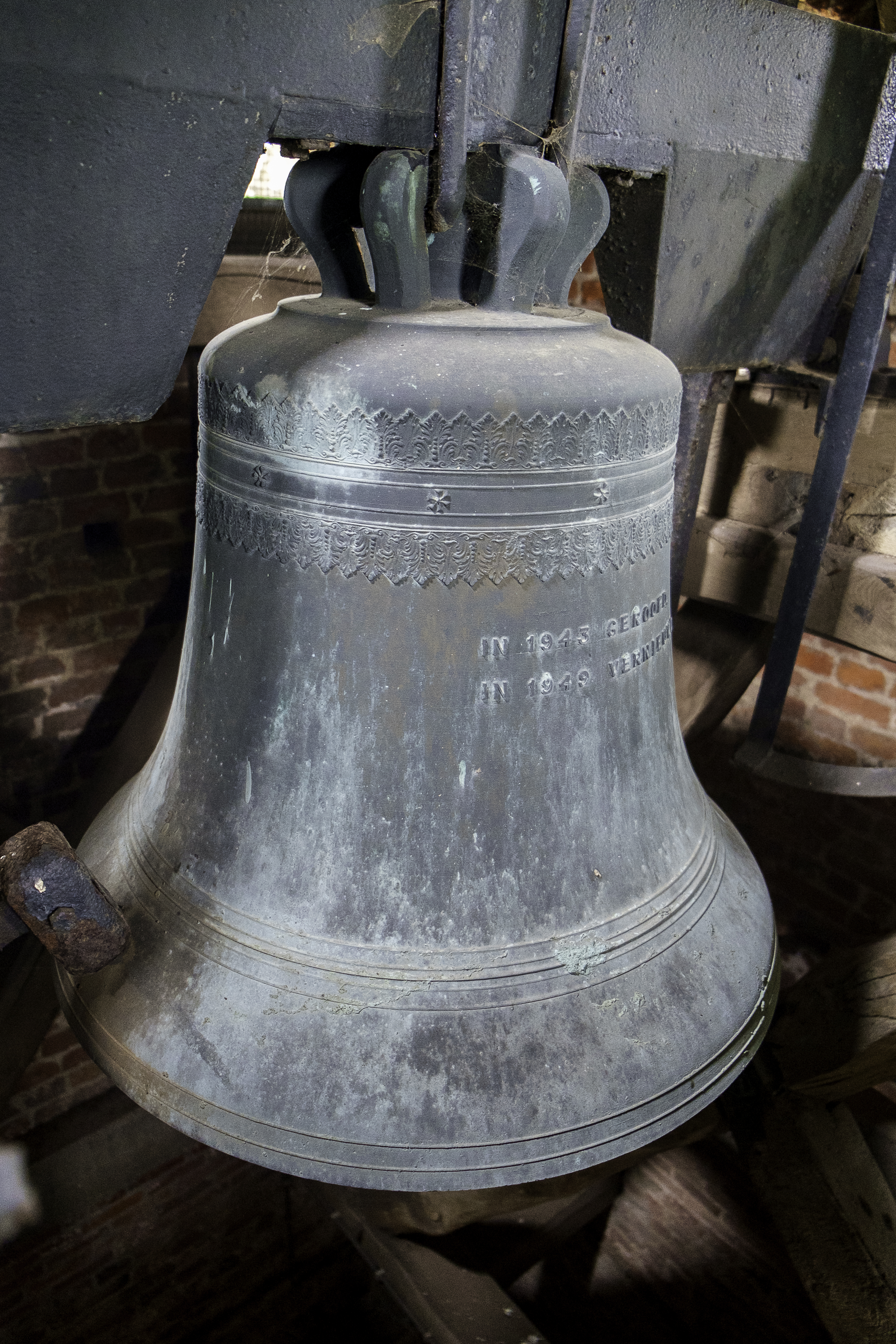 Klok in de Mariakerk in Krewerd